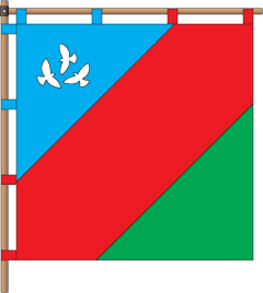 Прапор села Каракурт